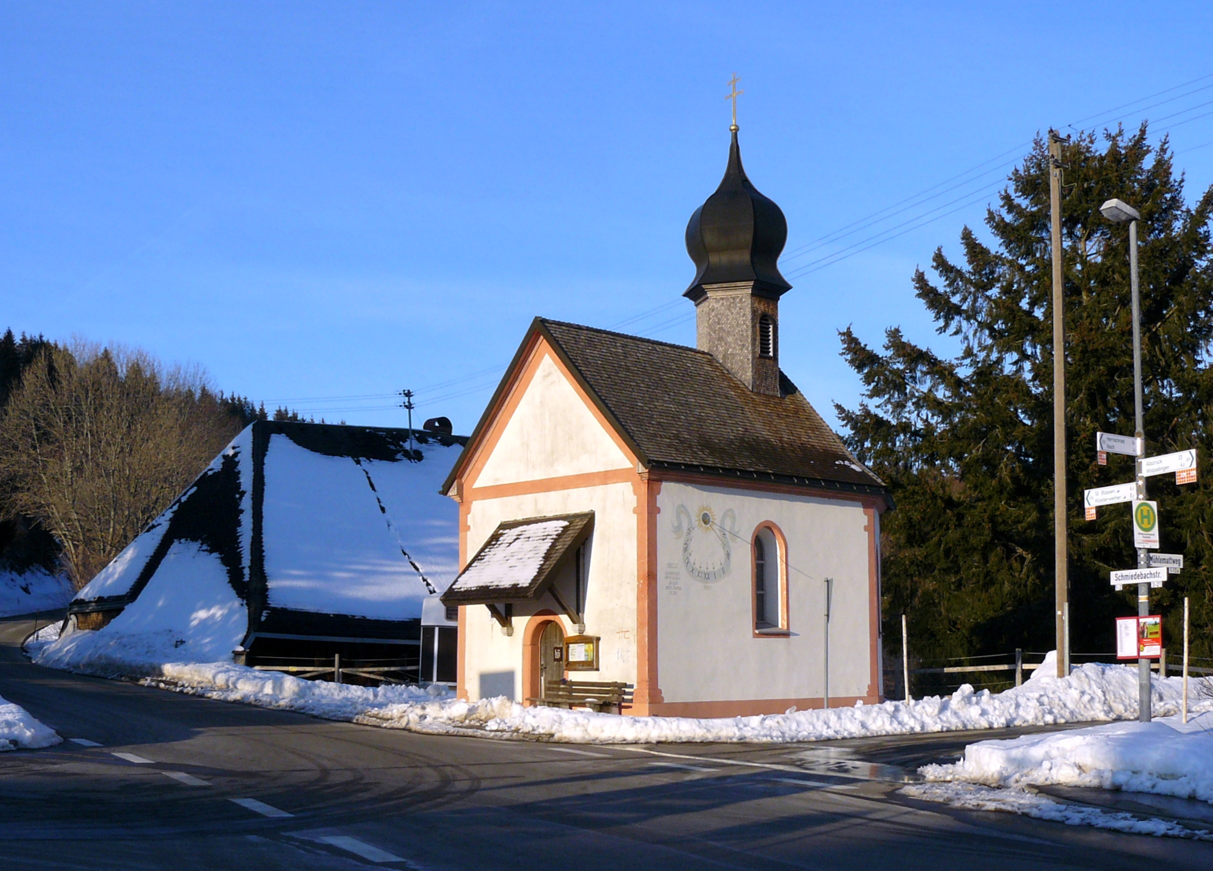 Andreaskapelle in Dachsberg-Wittenschwand im Winter